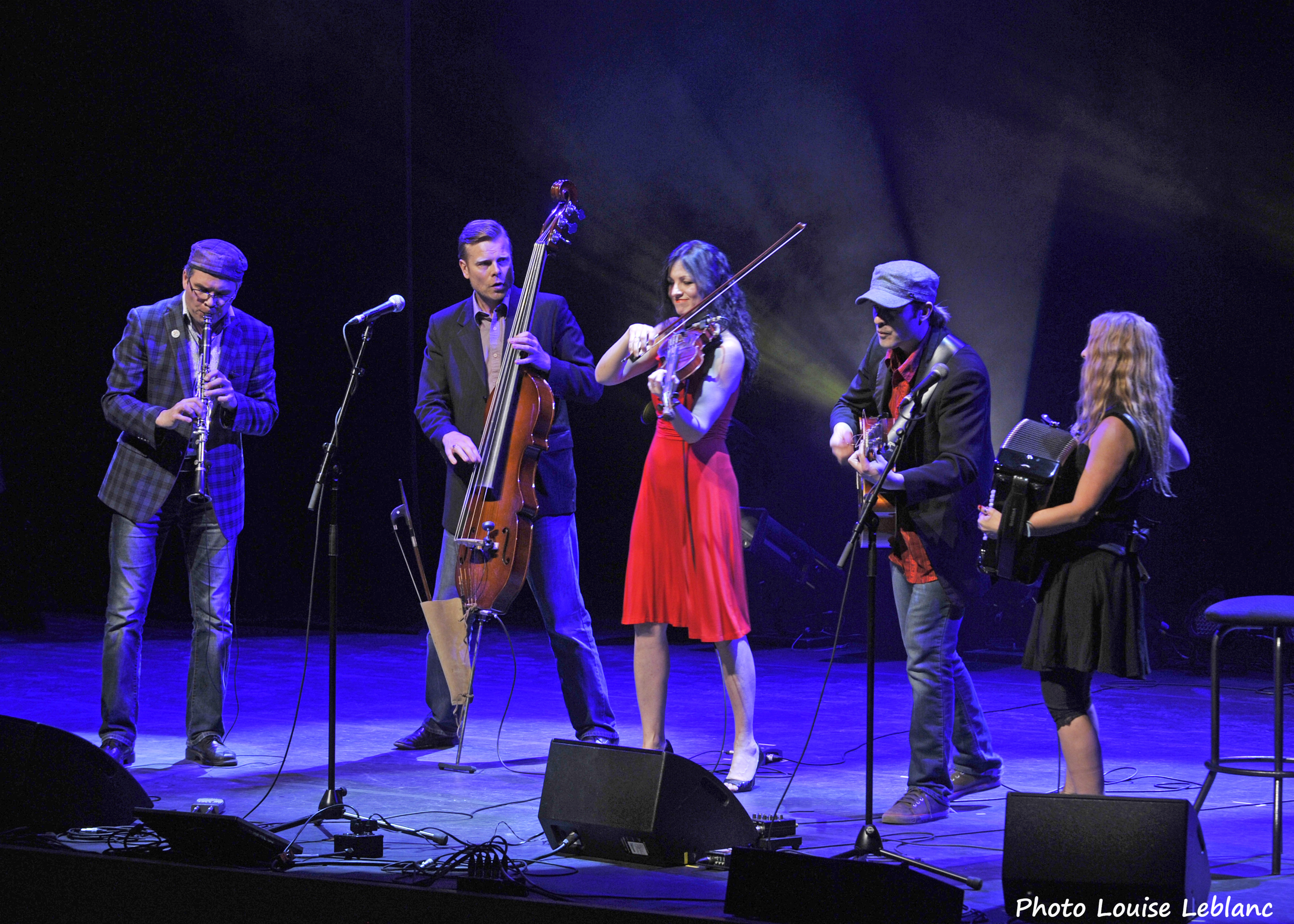 Kleztory